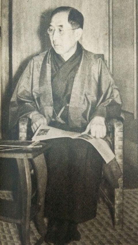 徳川家正